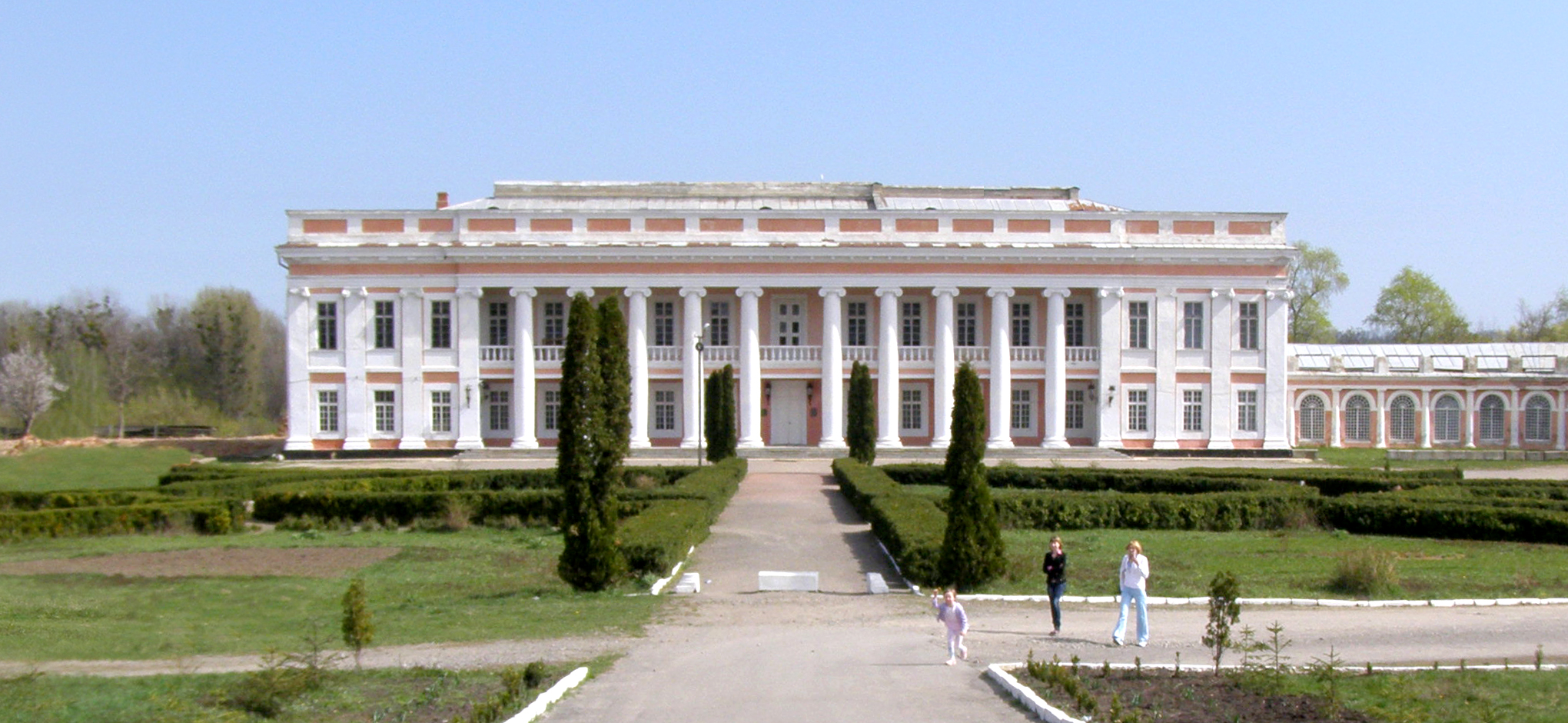 Палац Потоцьких, Тульчин: Головний корпус